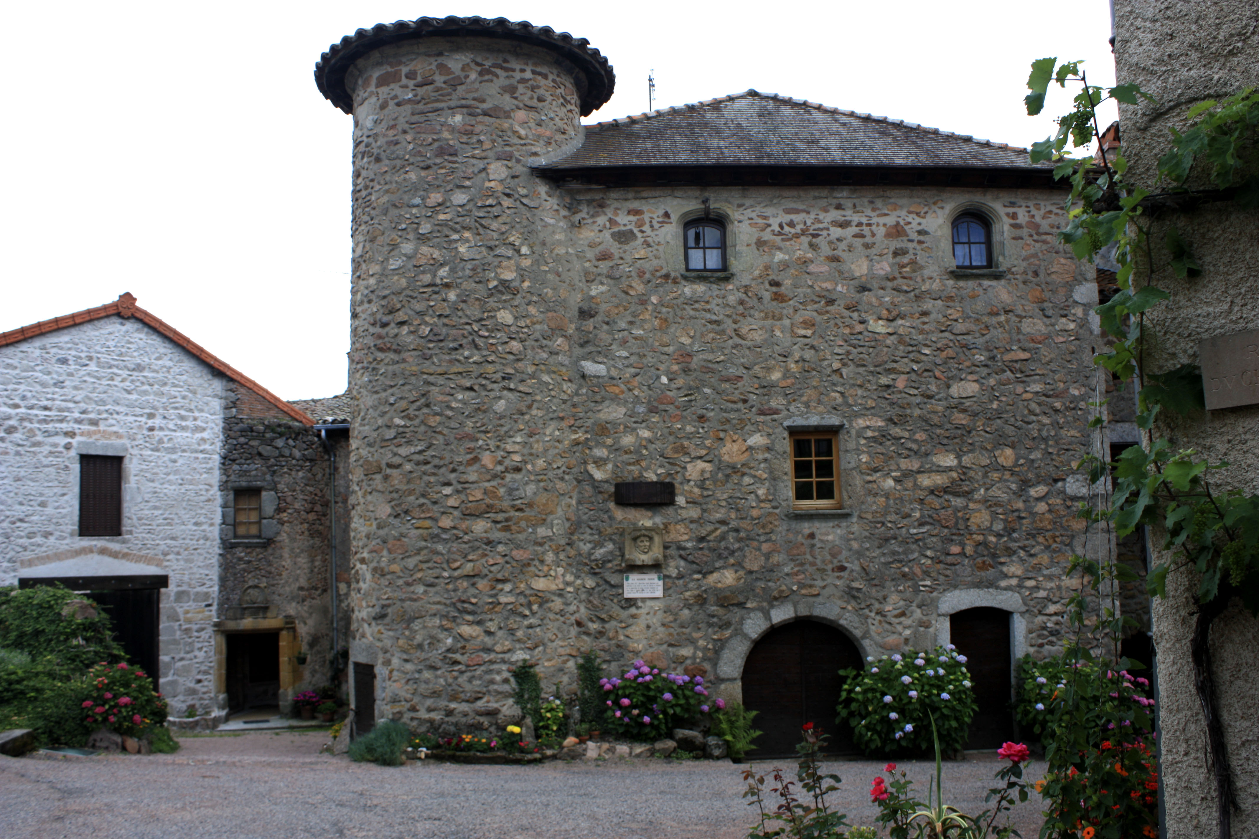 Le Crozet dans le département français de la Loire : Maison du conseiller Papon